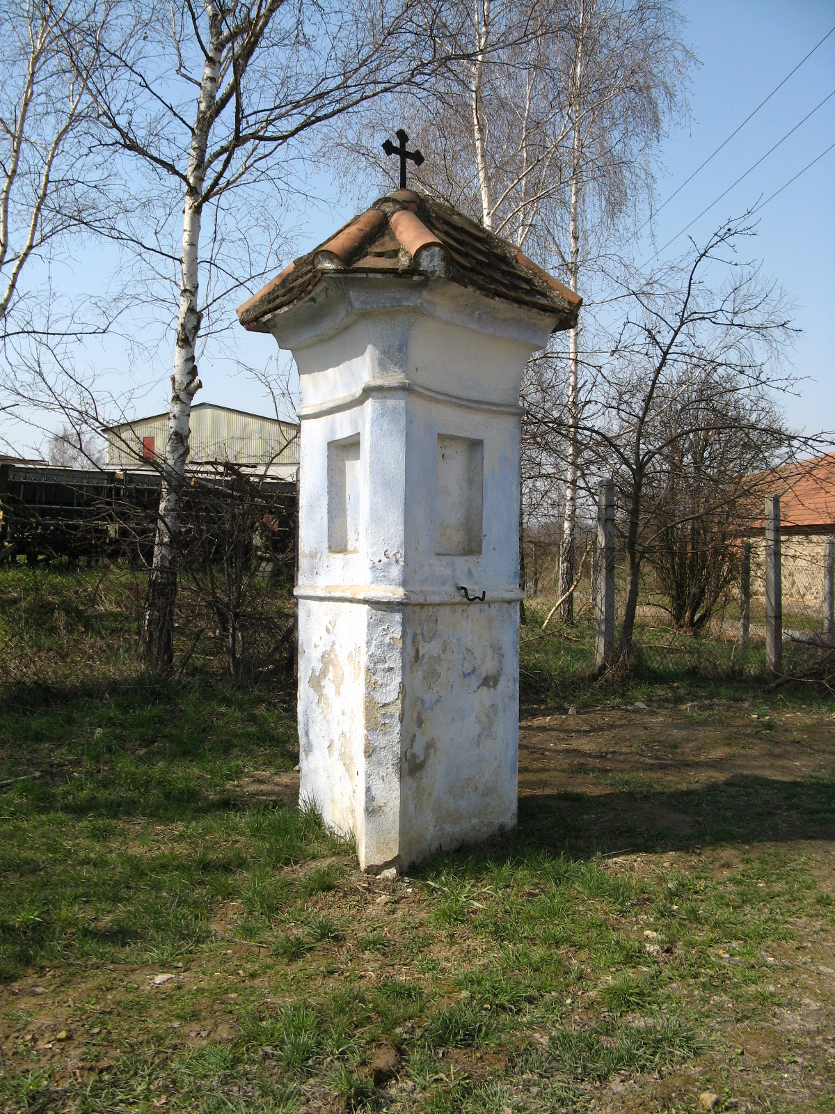 Boží muka (Soběsuky), J okraj obce, u silnice do Krumsína, Soběsuky